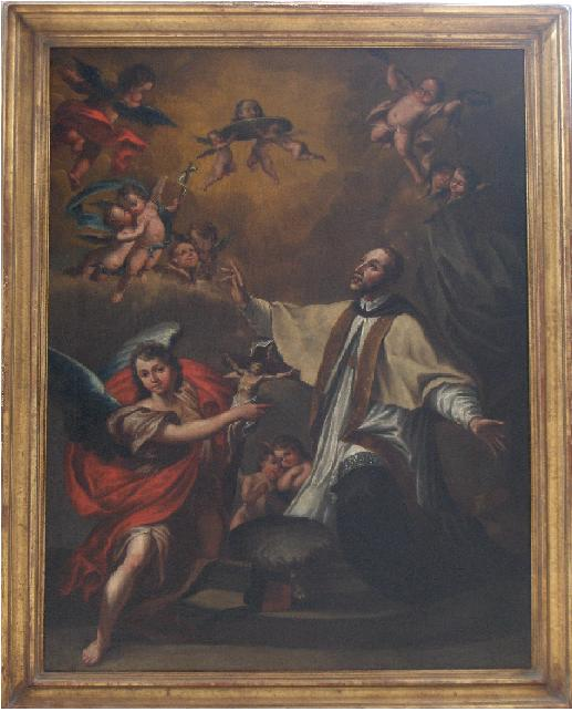 Giuseppe Antonio Luchi San Francesco Saverio; olio su tela cm. 73 x 98